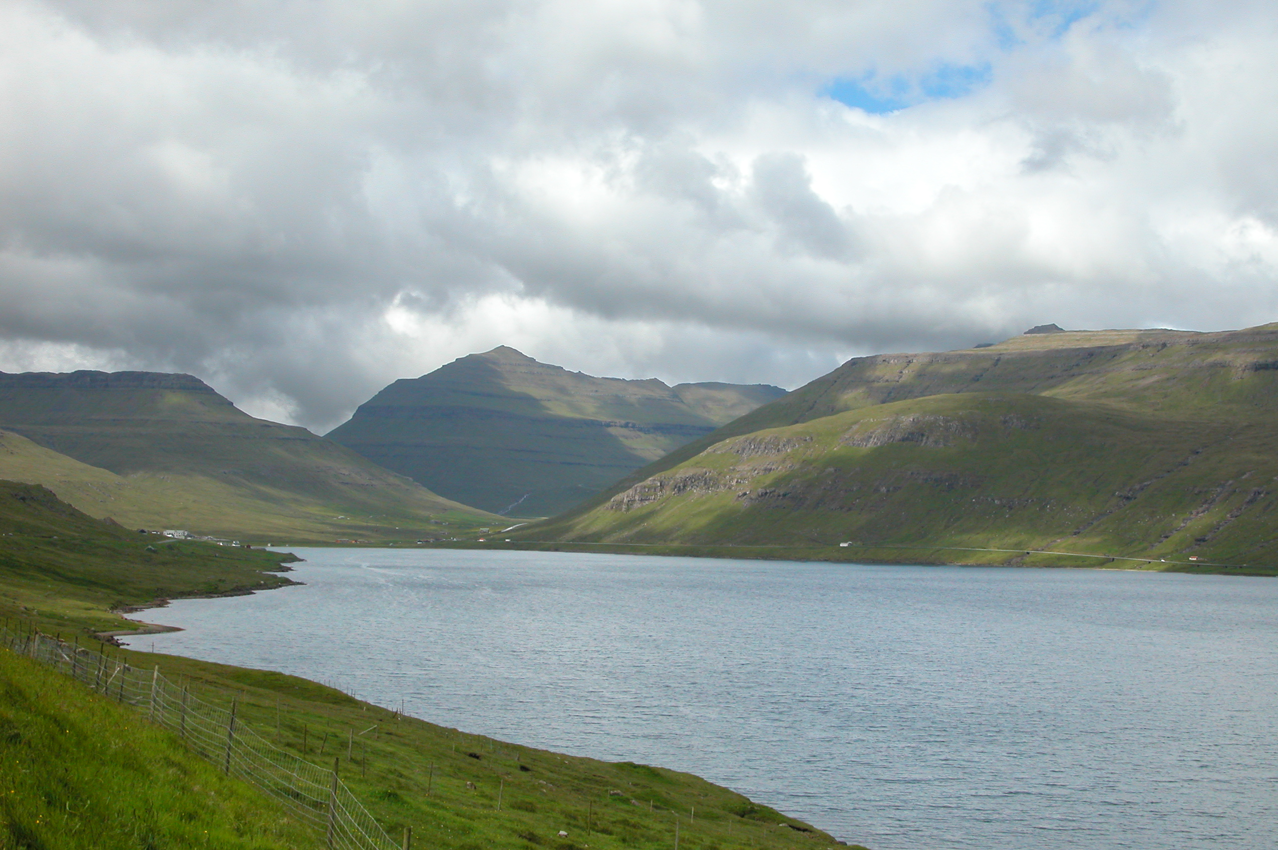 The inlet Skálafjørður, Eysturoy, Faroe Islands